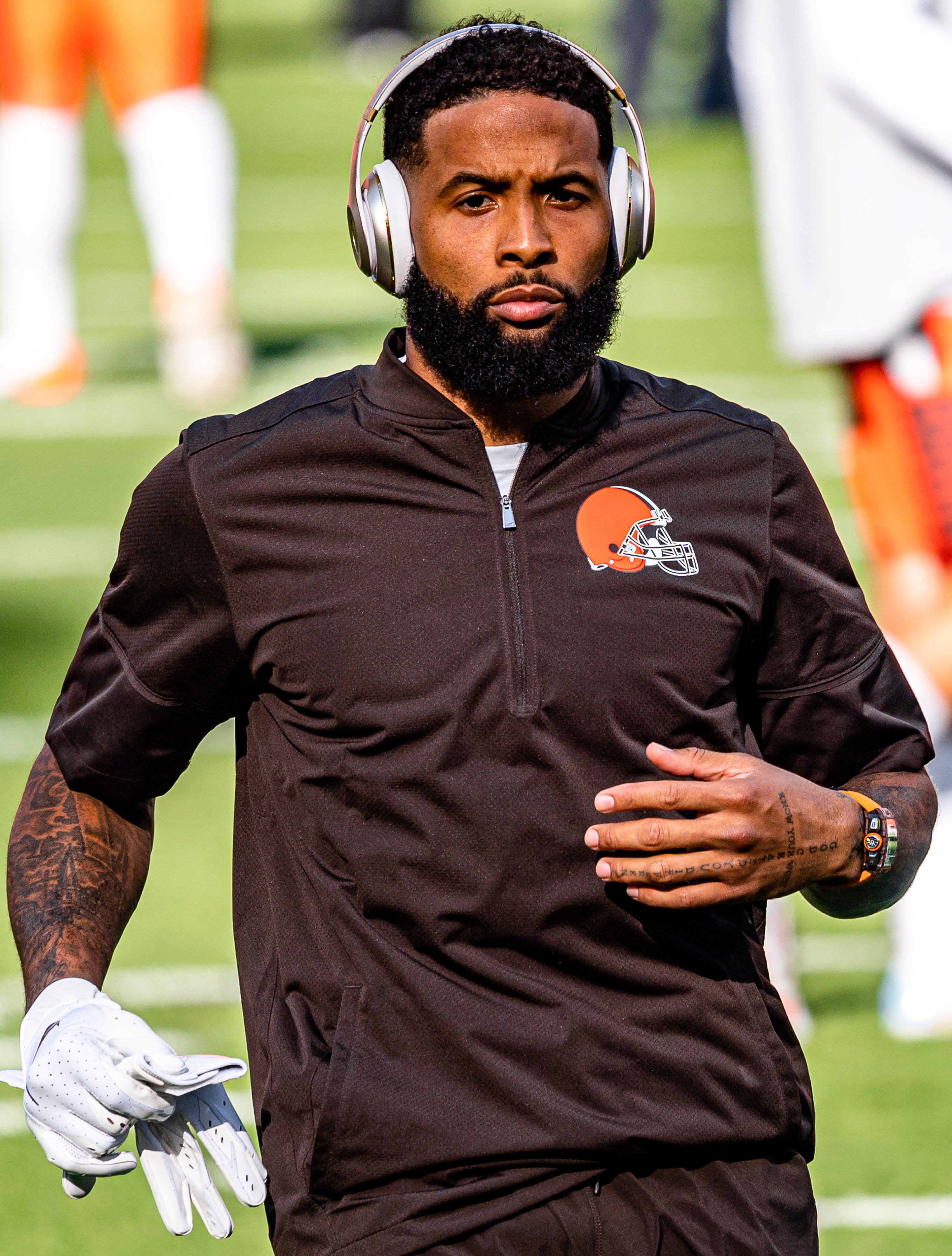 Odell Beckham Jr.